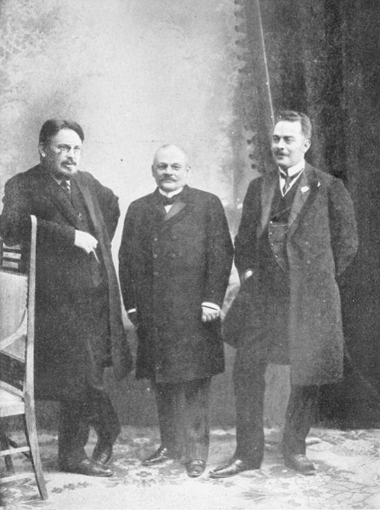 Организаторы Западно-русского съезда в Киеве: А. И. Савенко, Я. Н. Офросимов и И. Е. Ракович.